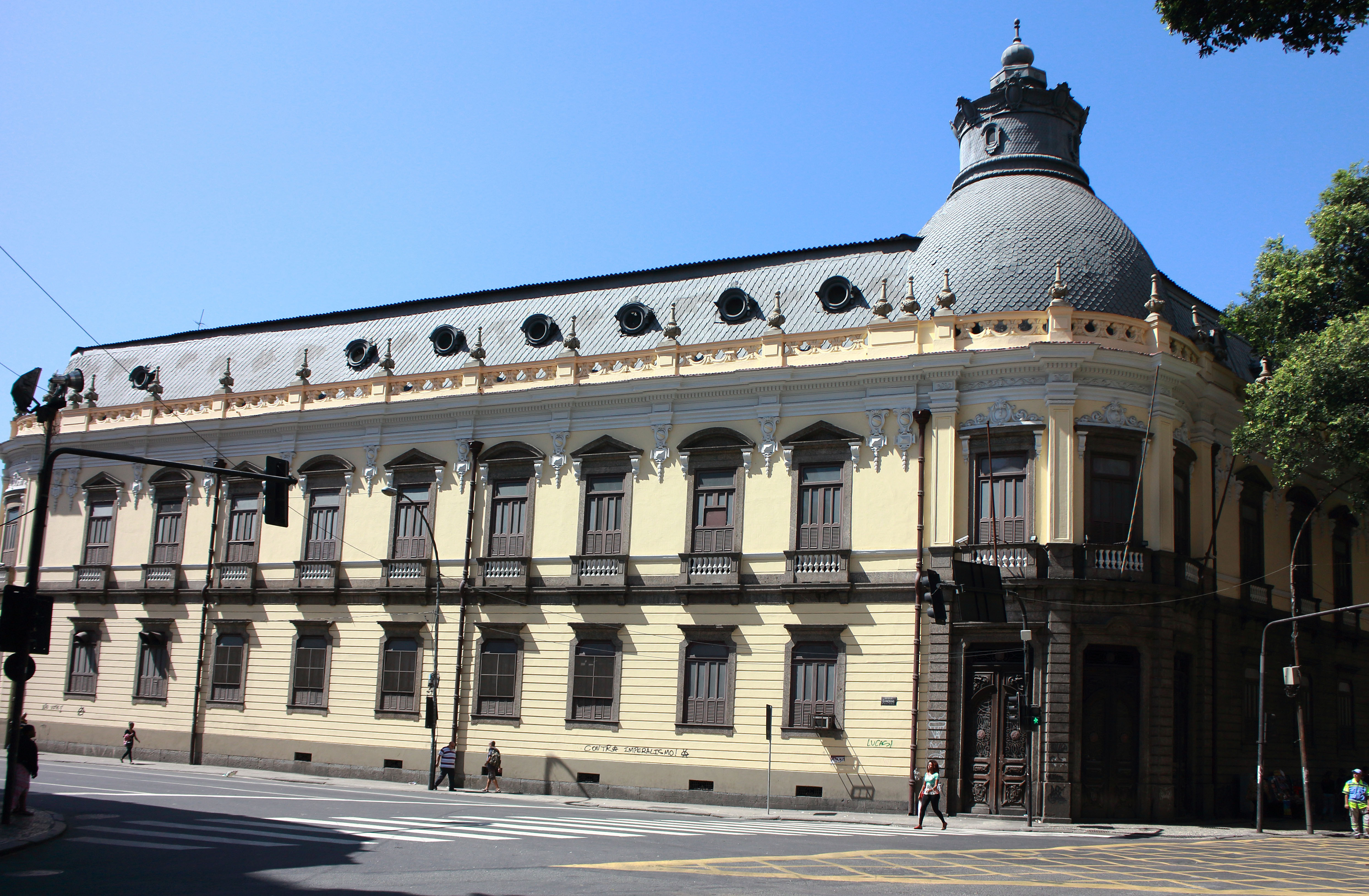 Colégio Pedro II - Centro